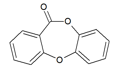 Strukturformel von 11H-Dibenzo(b,e)(1,4)dioxepin-11-on